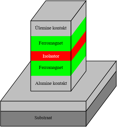 Magnetilise tunnelventiili ehitust kirjeldav lihtsustatud joonis.